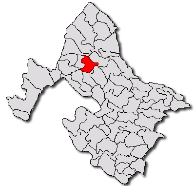 Categorie:Hărţi ale judeţului Mehedinţi